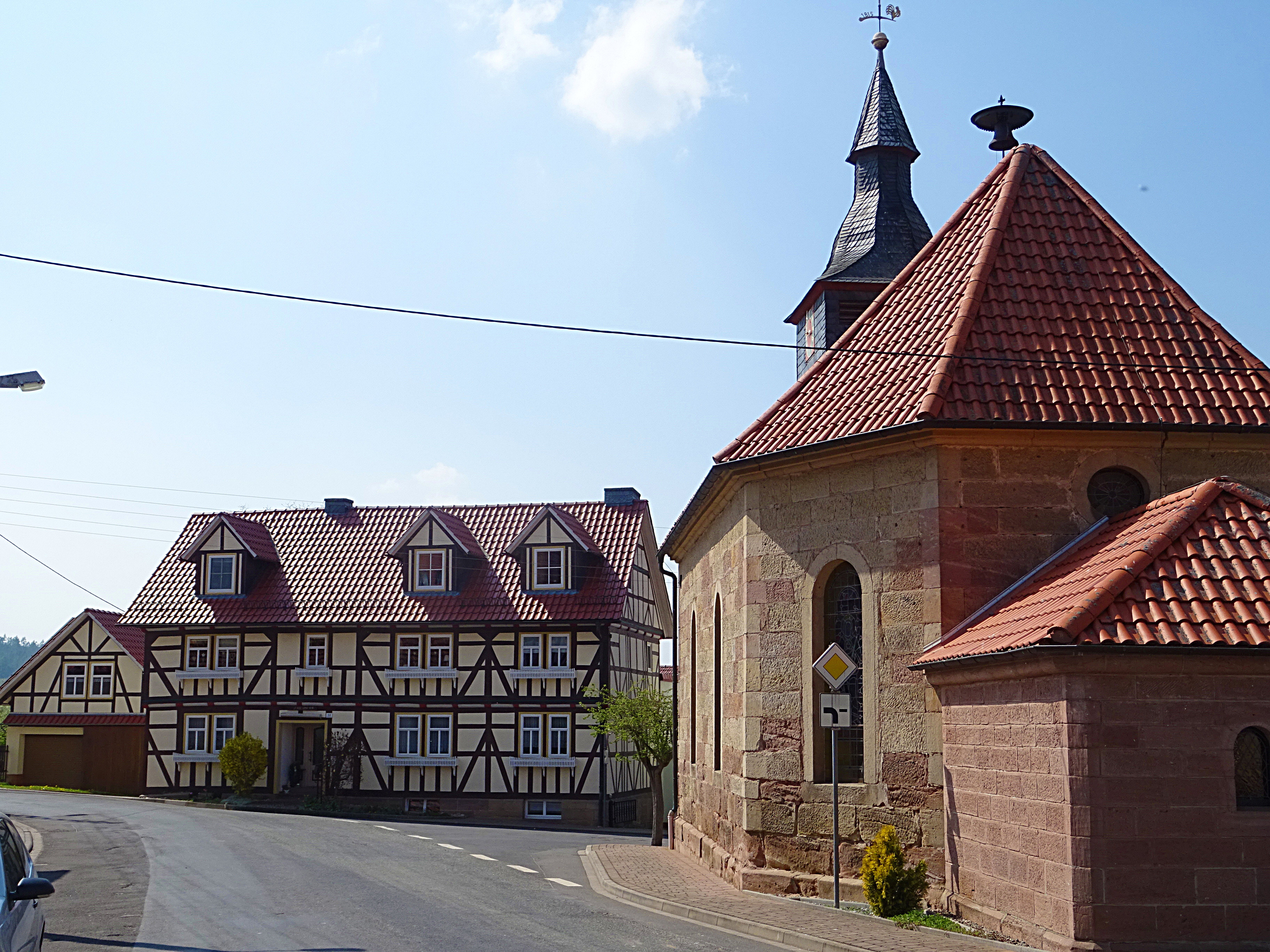 Eichstruth im Eichsfeld mit der Allerheiligenkirche